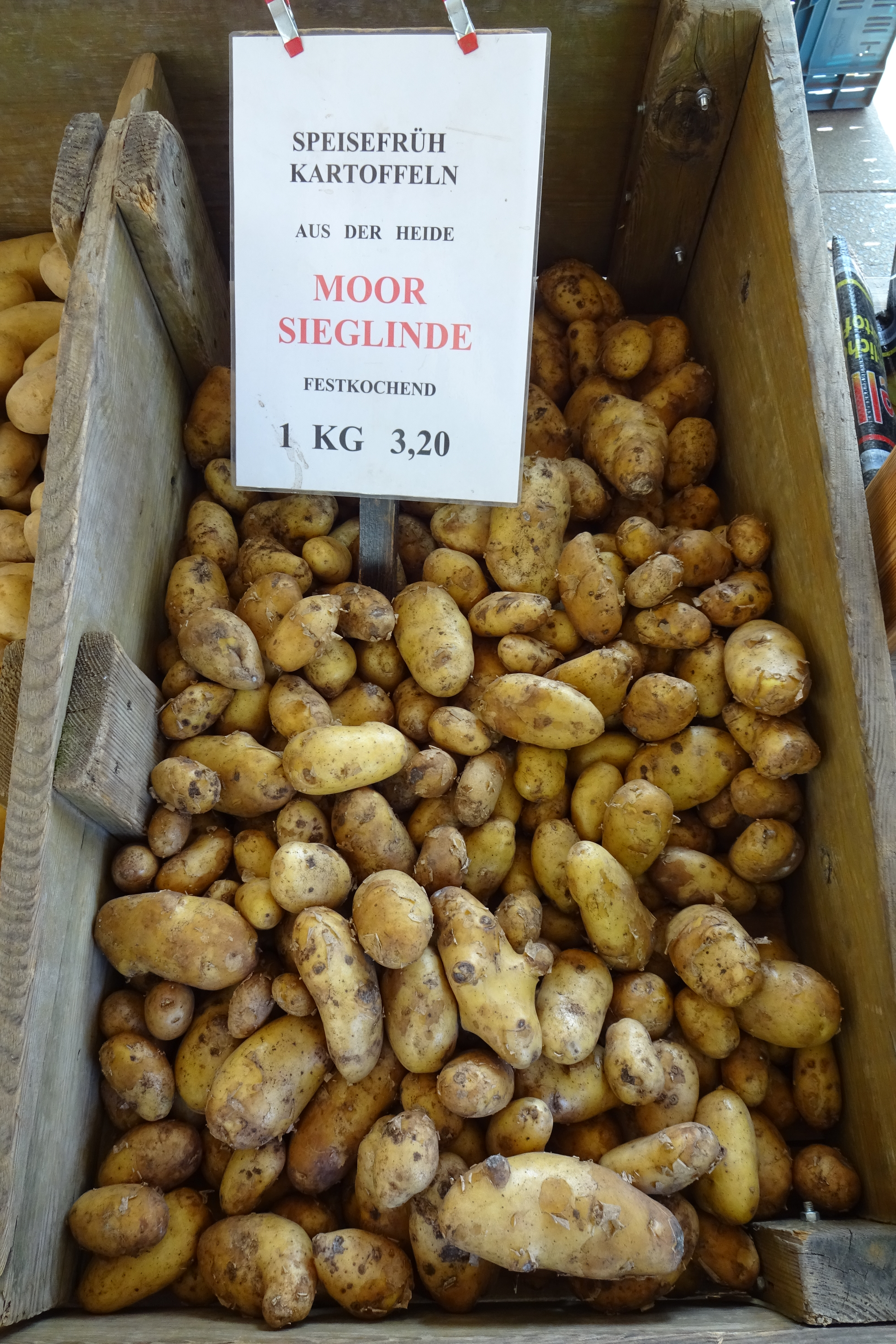 Speisekartoffeln der Sorte 'Moor Sieglinde', festkochend